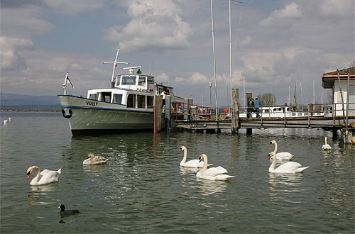 Murten: Schiffländte